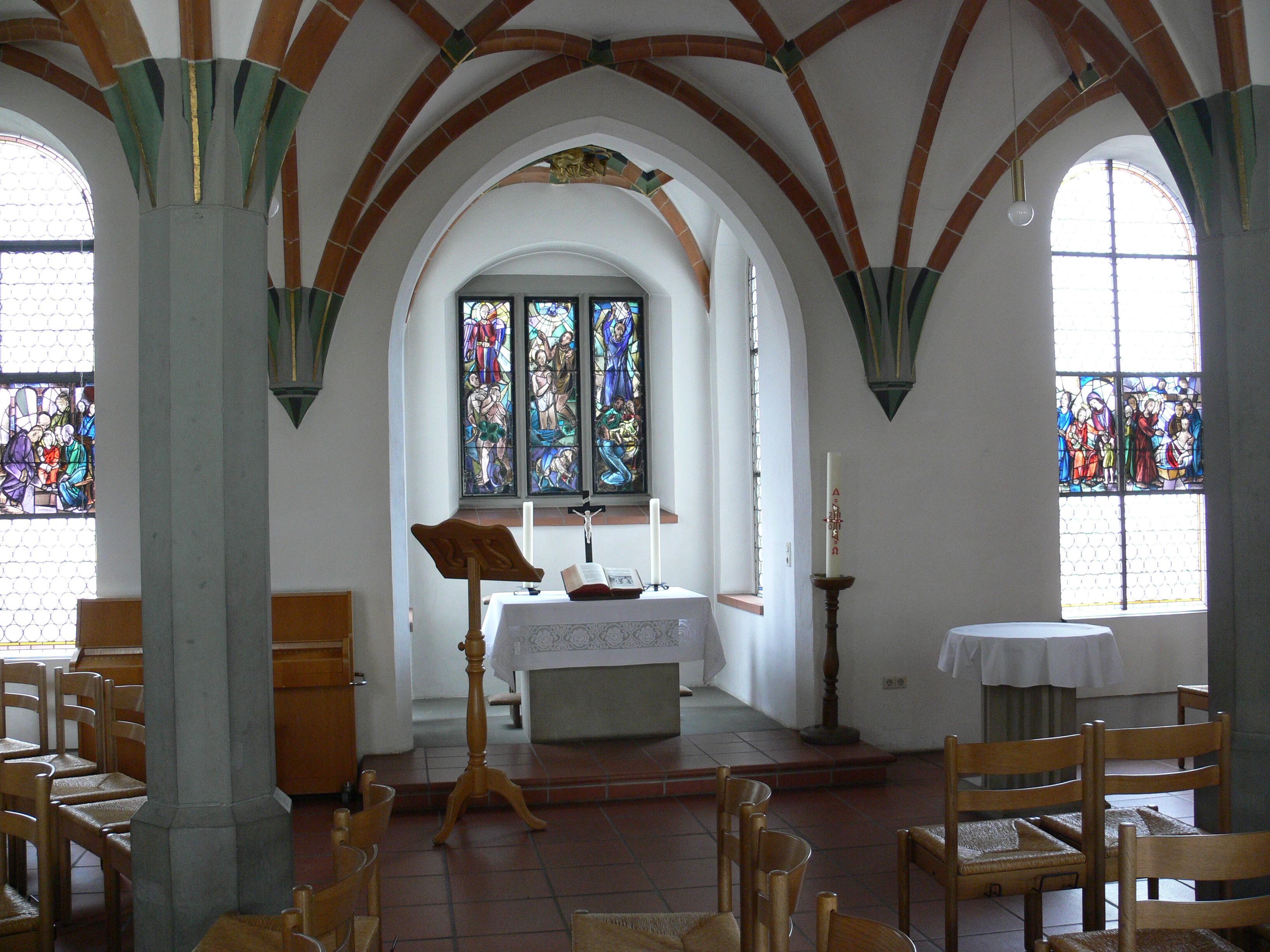 Evangelische Spitalkirche (ehemalige Krankenstube des Spitals), Biberach an der Riß Blick zum Altar